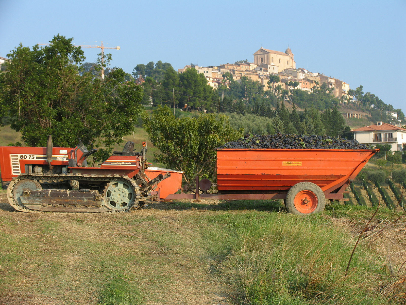 Trattore FiatAgri 80-75 cingolato, Montepulciano, Toscana, ItaliaUva san giovese a Montepulciano